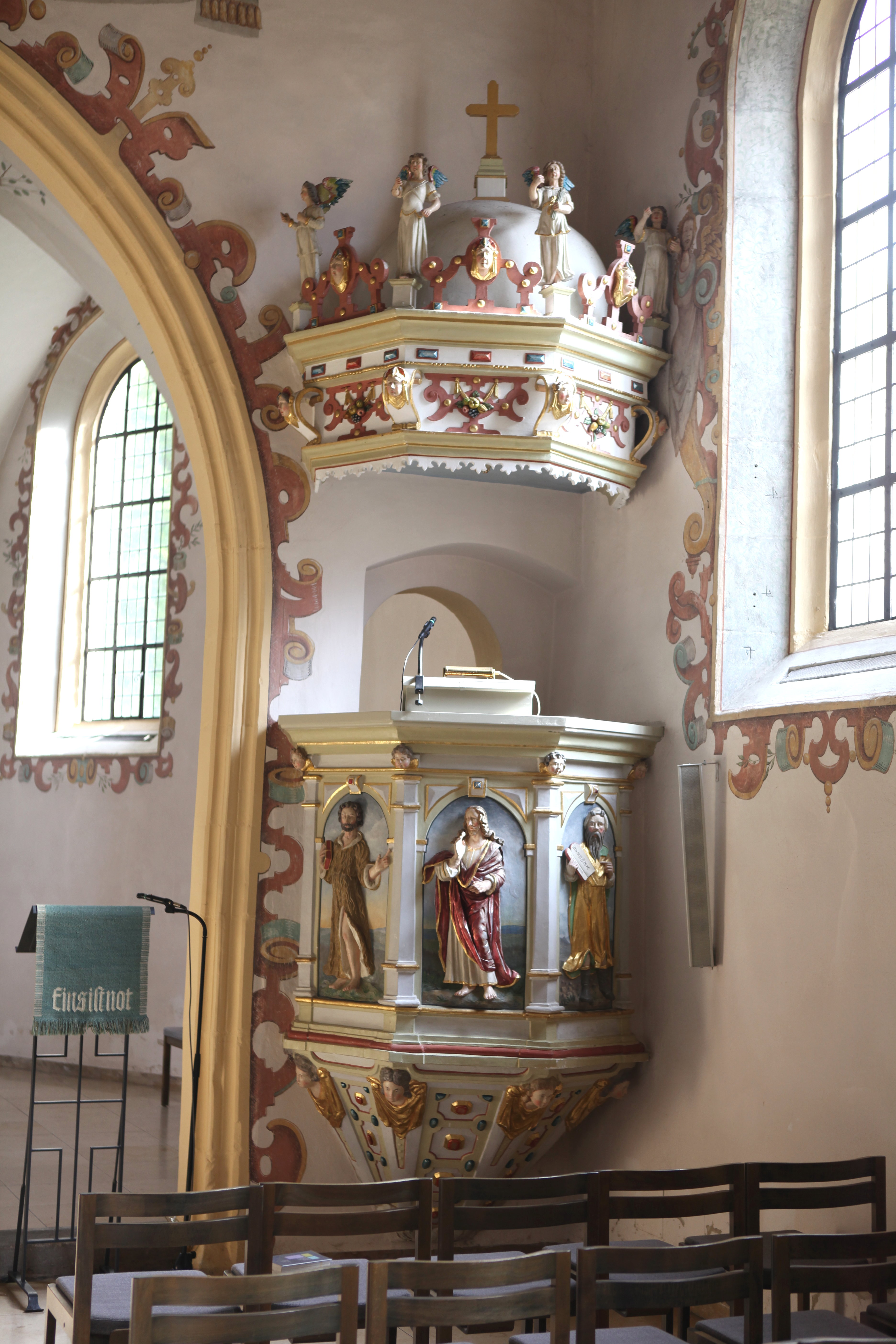 Evangelische Pfarrkirche St. Johannis in Rödental, OT Oeslau, Landkreis Coburg